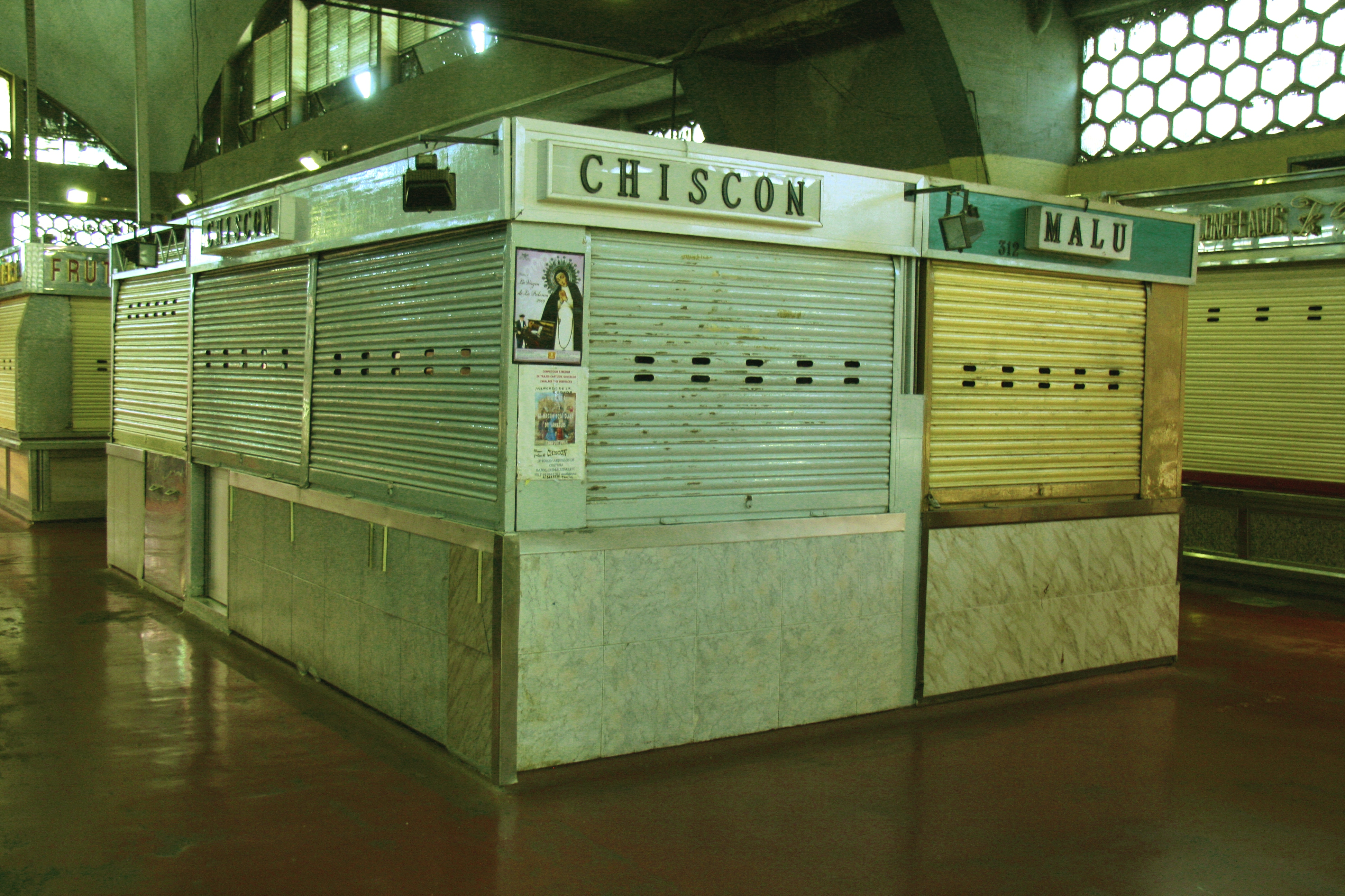 Puestos dentro del Mercado de la Cebada (Madrid) -2009